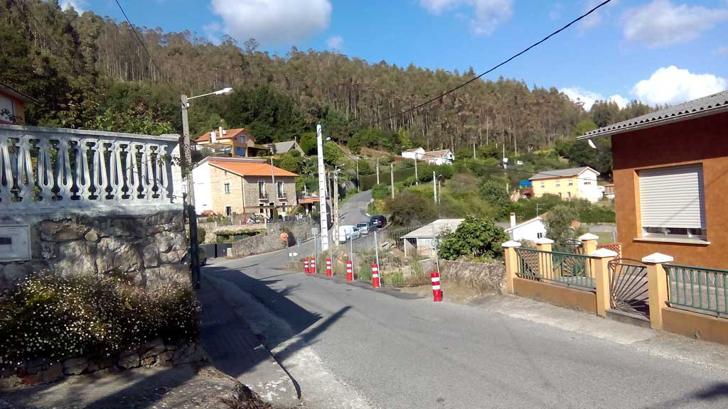 Vista do Vilar, Doniños.